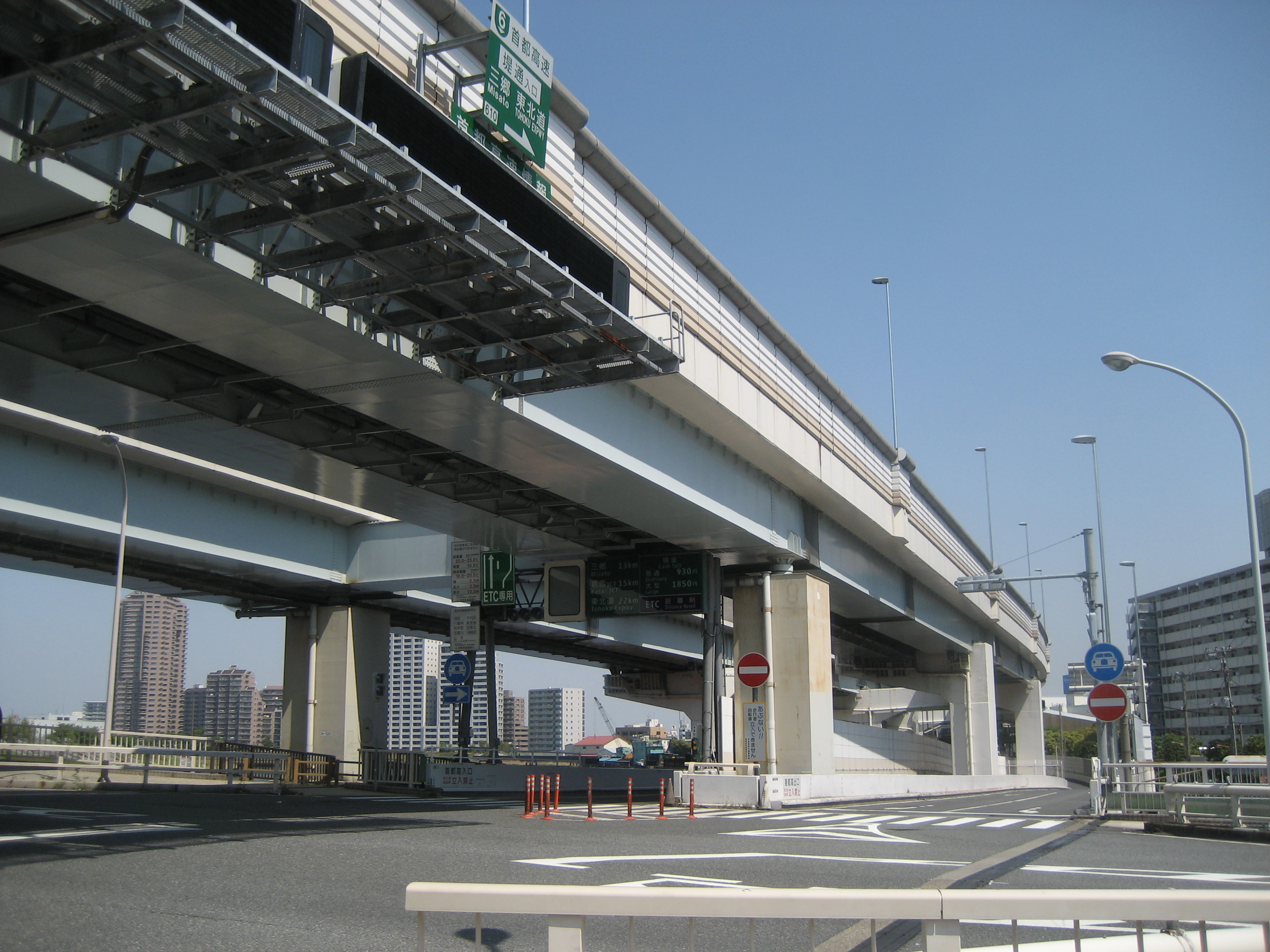 首都高速6号向島線堤通出入口（堀切JCT方面側）